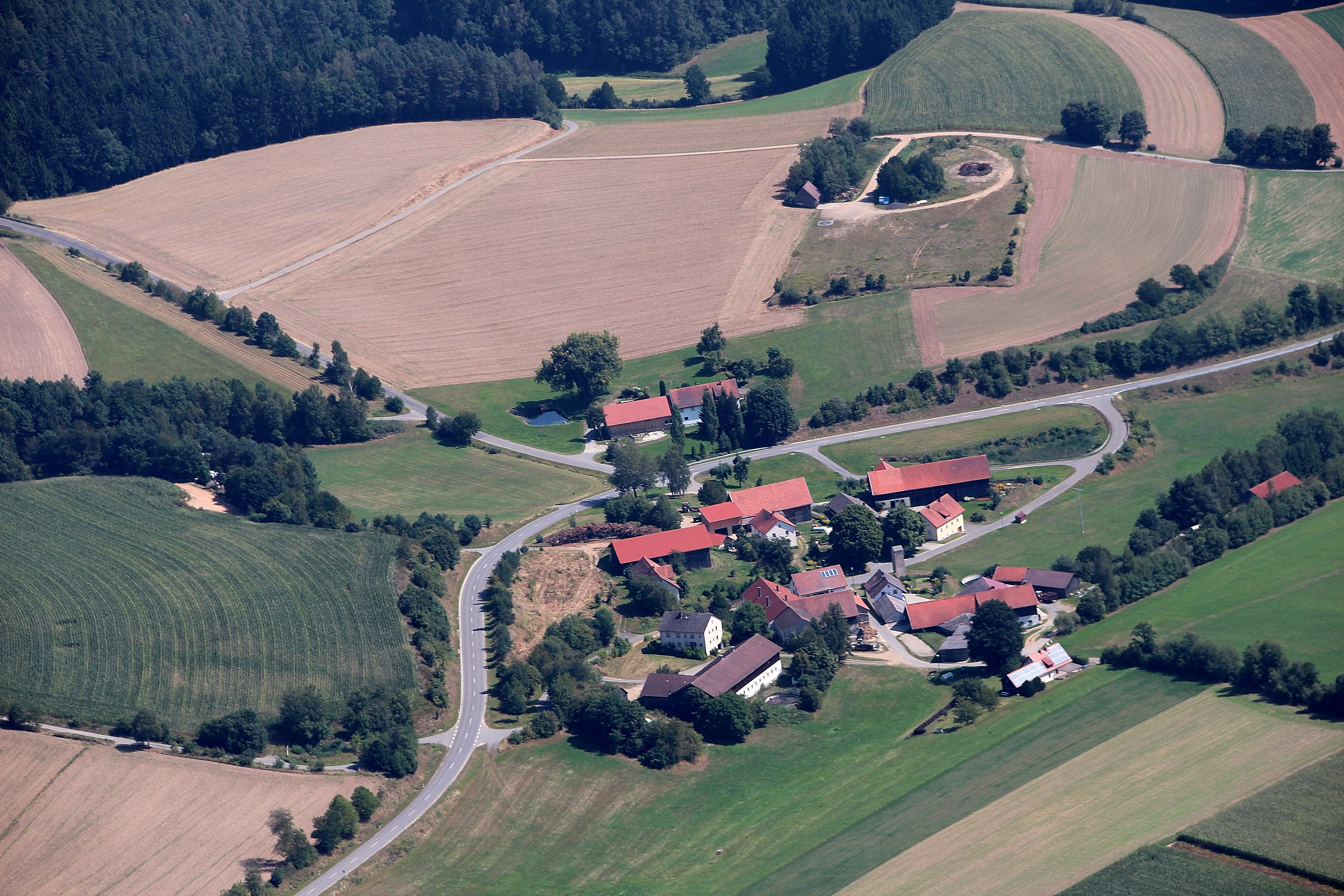 Zankendorf ist ein Ortsteil der Gemeinde Niedermurach, Landkreis Schwandorf, Oberpfalz, Bayern